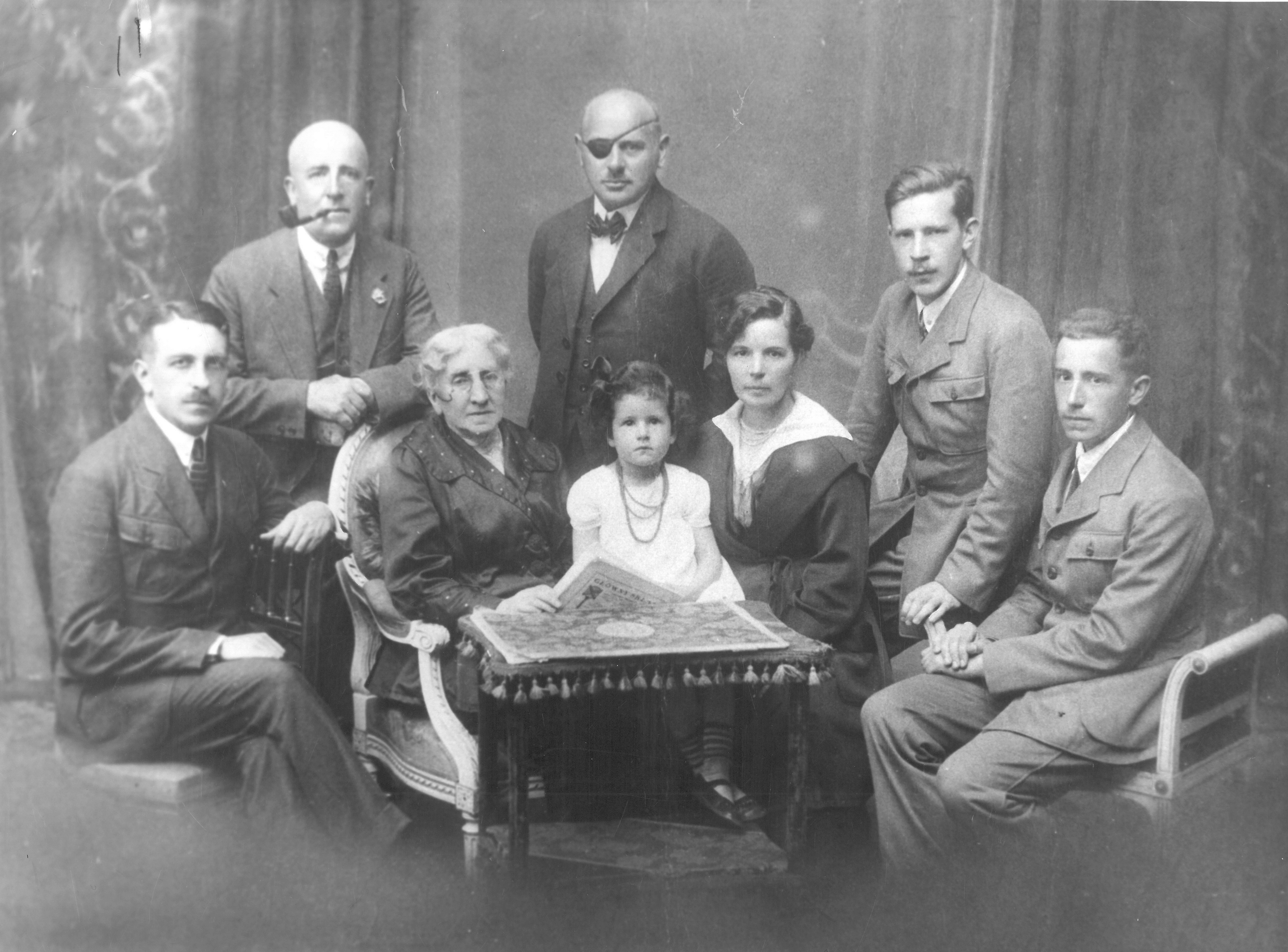 Portret rodzinny rodziny Hiszpańskich, lata 30.